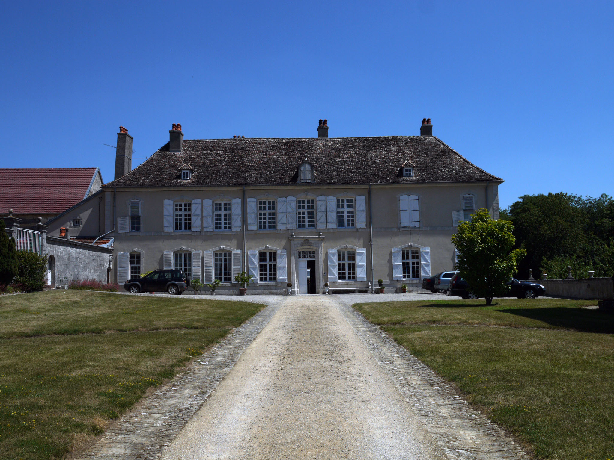 Le château d'Autigny-la-Tour, Vosges, France